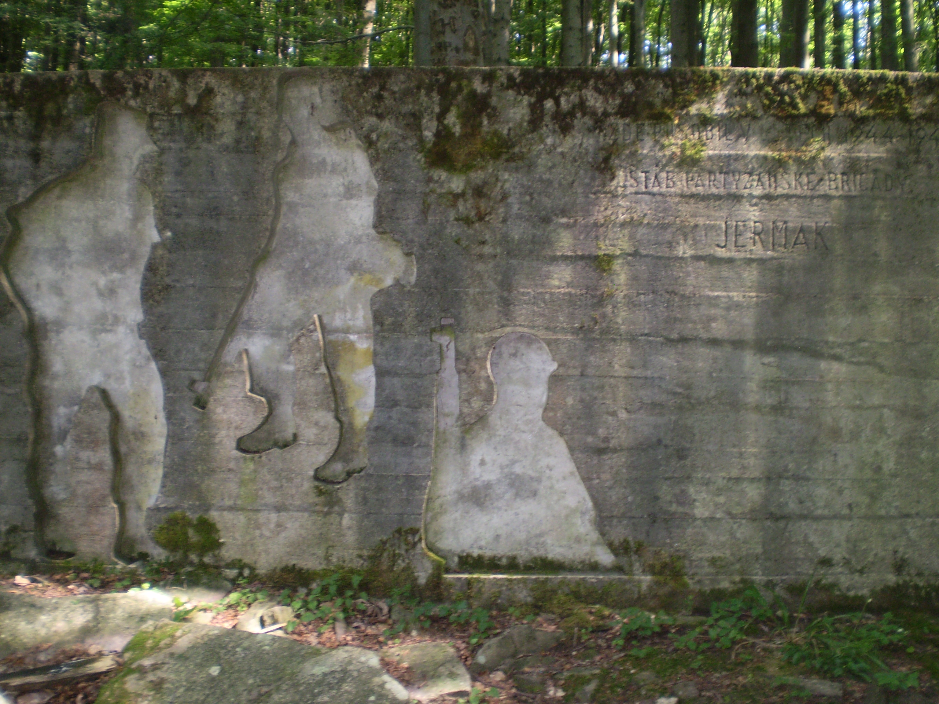 Jermak